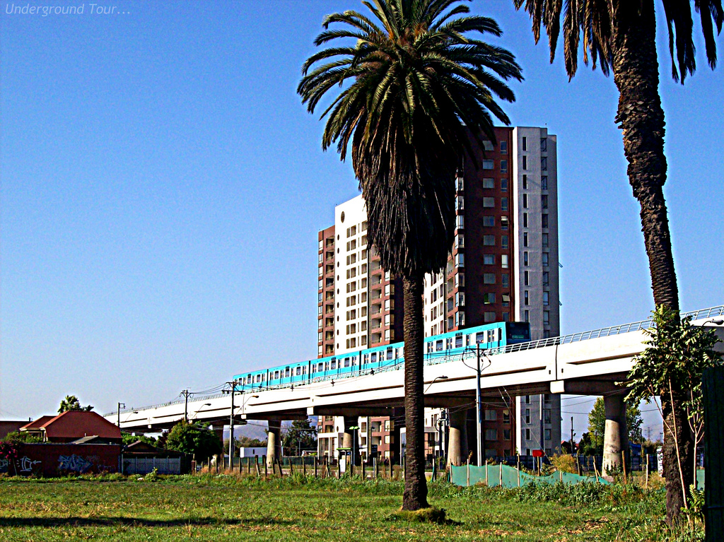 Es parte del paisaje que rodea el viaducto que es parte de la recientemente inaugurada extensión de la Línea 5 del Metro de Santiago a Maipú. Esta fotografía corresponde a un sector entre las estaciones "Laguna Sur" y "Las Parcelas". Espero que les guste... Saludos. frronet c_commons 2011 | xtrapotrenes 20once. Click aquí para ver la foto en su tamaño original.